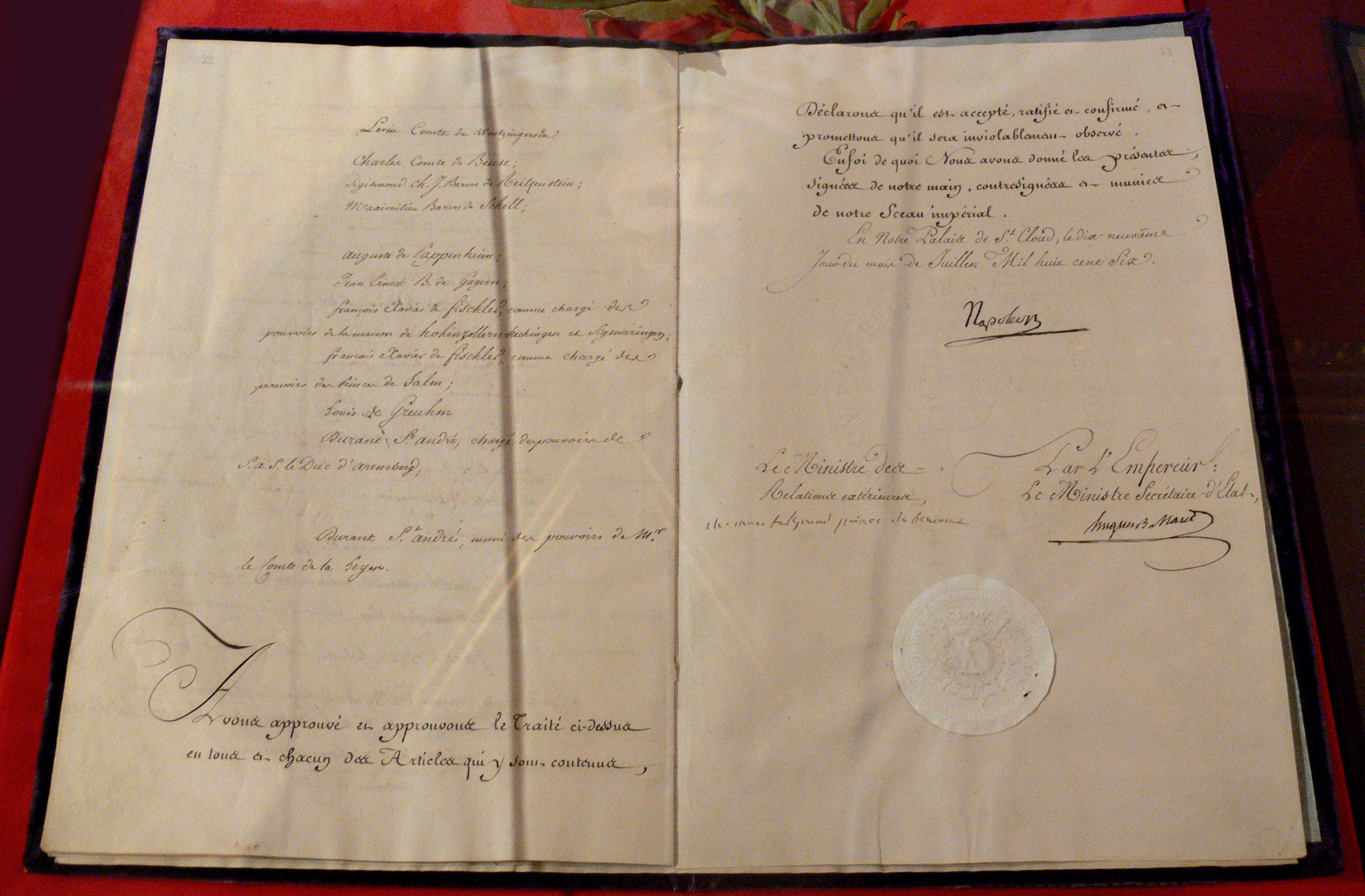 Rheinbundakte vom 12. Juli 1806 mit der Unterschrift Napoleons, Exemplar für das Fürstentum Hohenzollern-Sigmaringen, Paris/Sigmaringen 12./19. Juli 1806; Landesarchiv Baden-Württemberg, Staatsarchiv Sigmaringen, Ho 80A T 1 U 1805 Juli 12/19